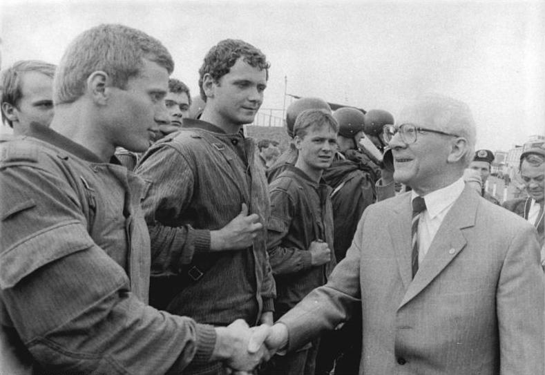 DDR, NVA-Truppenbesuch, Honecker ADN-ZB Mittelstädt 21.6.84 DDR: Truppenbesuch- Nachdem Fallschirmjäger aus dem Truppenteil "Willi Sänger" Elemente ihrer Gefechtsausbildung demonstriert hatten, dankte der Generalsekretär des ZK der SED und Vorsitzender des Staatsrates der DDR, Erich Honecker, Vorsitzender des Nationalen Verteidigungsrates der DDR, den Soldaten für ihre gezeigten Leistungen. Abgebildete Personen: Honecker, Erich: Staatsratsvorsitzender, Generalsekretär des ZK der SED, DDR (GND 118553399)